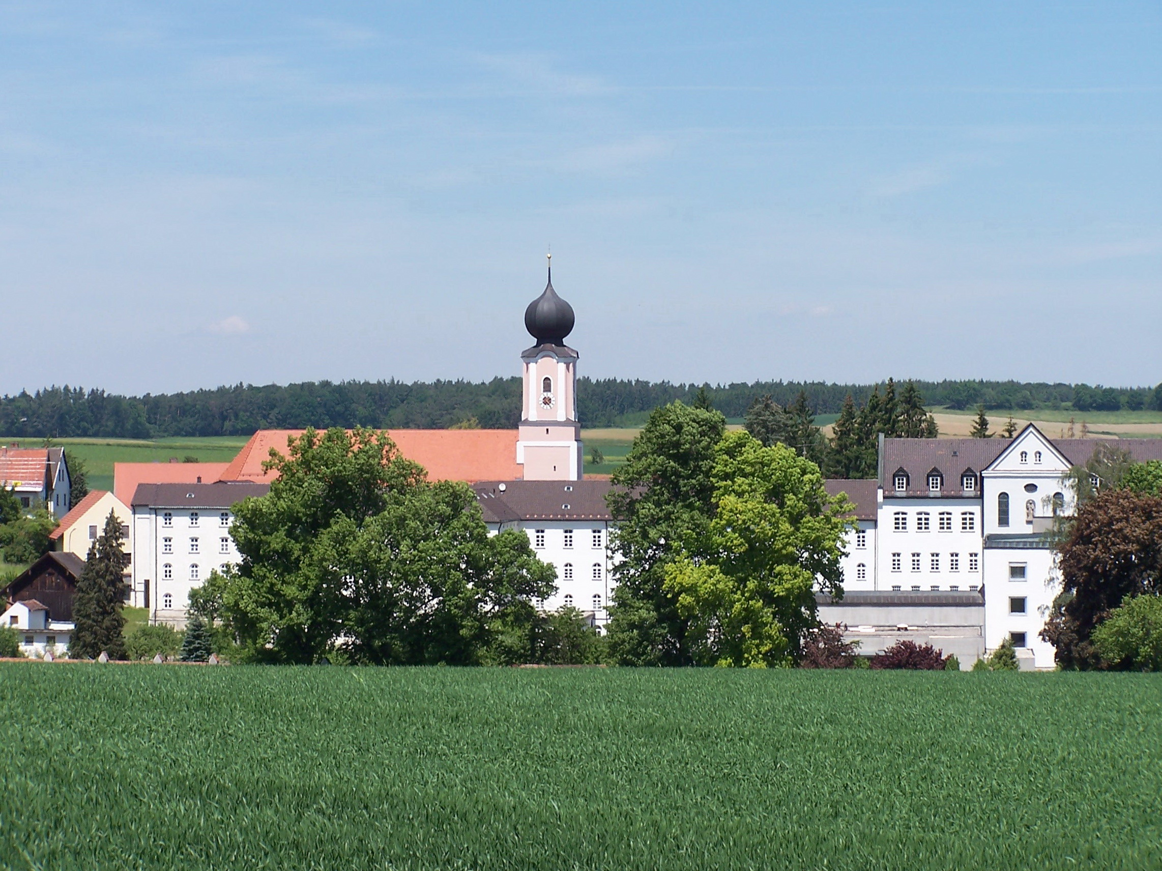 Rottenburg an der Laaber. Oberroning Haus Nummer 7. Salesianerinnenkloster, Rechteckanlage mit Walmdach, erbaut 1839/45, erweitert 1862/64.